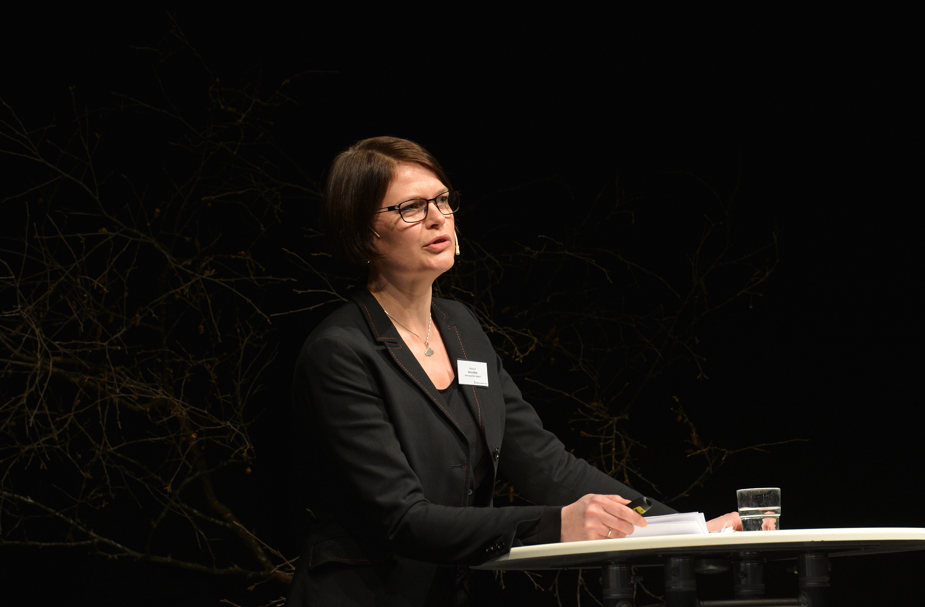 Anna Ceselie Brustad Moe, næringspolitisk rådgiver i ALLSKOG på Trøndelagsmøtet 2013.